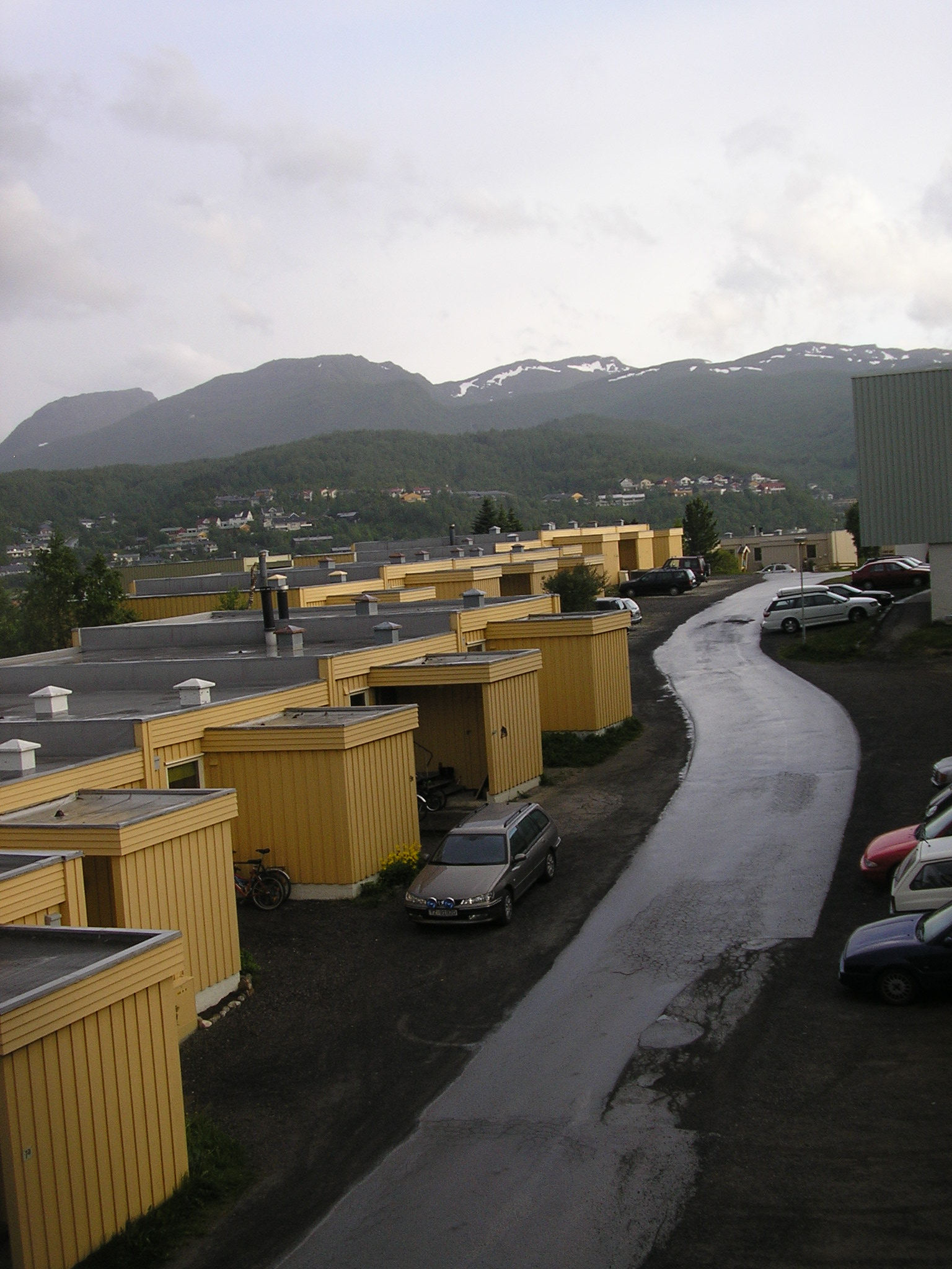 Vollen in rain.